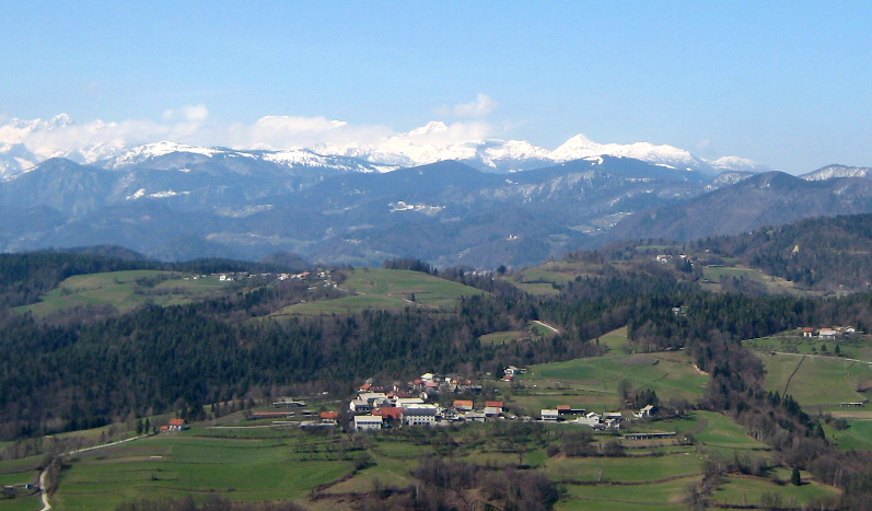 Krajno Brdo, village in Slovenia